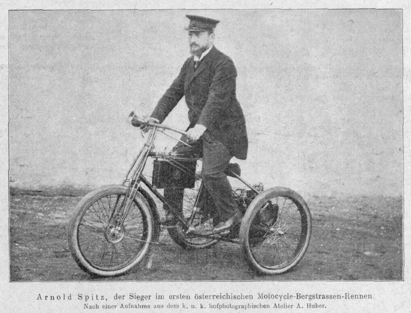 Arnold Spitz Motorsportler und Automobilhändler. Sieger beim Ersten Bergstraßenrennen für Motorcycles in Wien.